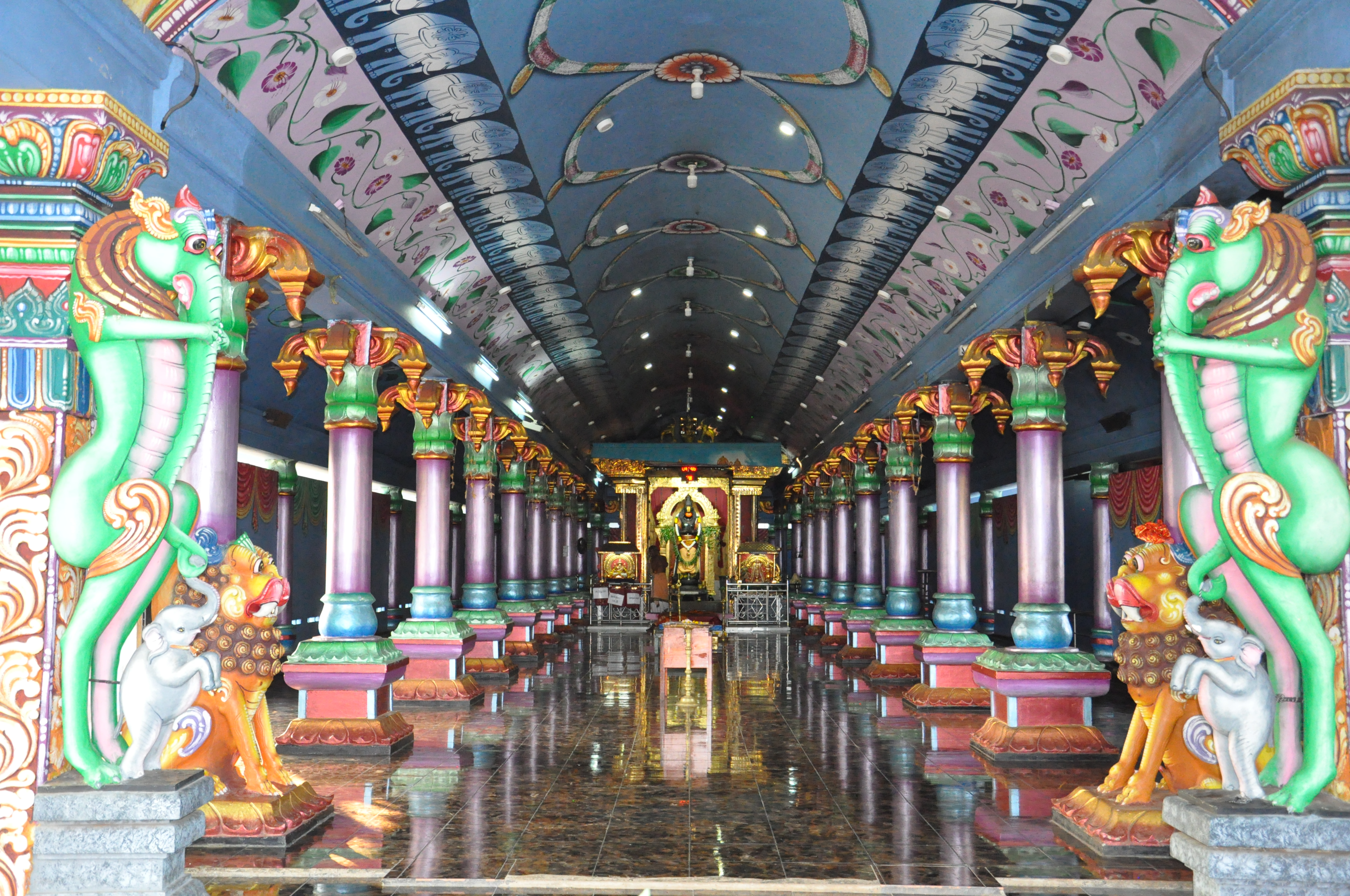 கோவில் மண்டபம்